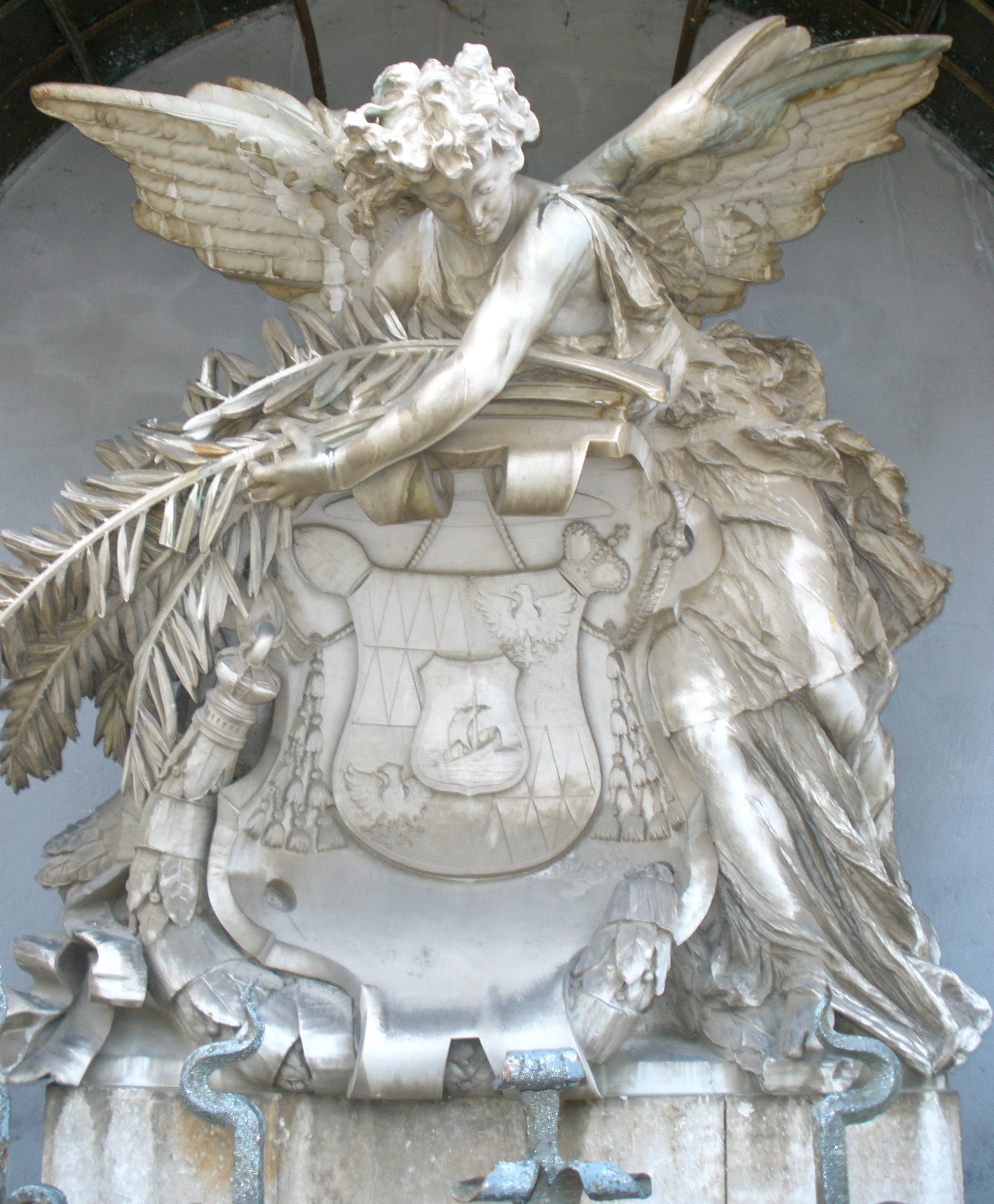 Wappenrelief des Erzbischofs von Olmütz Dr. Theodor Kohn (1893 - 1904), das die Außenmauer des Mausoleums in Ehrenhausen ziert. Erzbischof Dr. Kohn ist 1915 in dieser südsteirischen Marktgemeinde verstorben und in jenem Mausoleum beigesetzt.